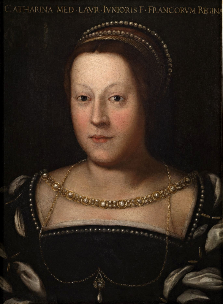 Caterina de' Medici